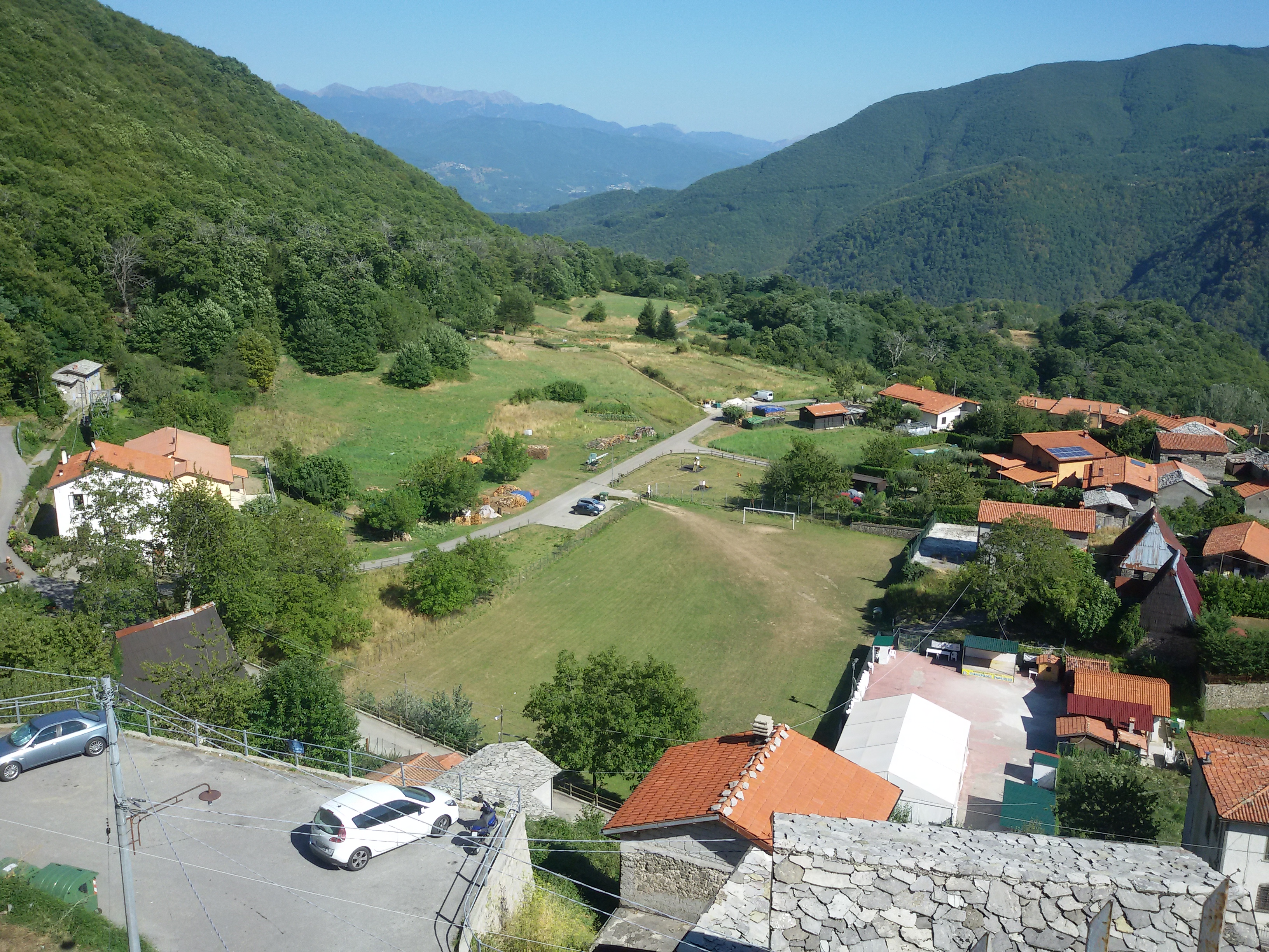 ROGGIO- CENTRO SPORTIVO